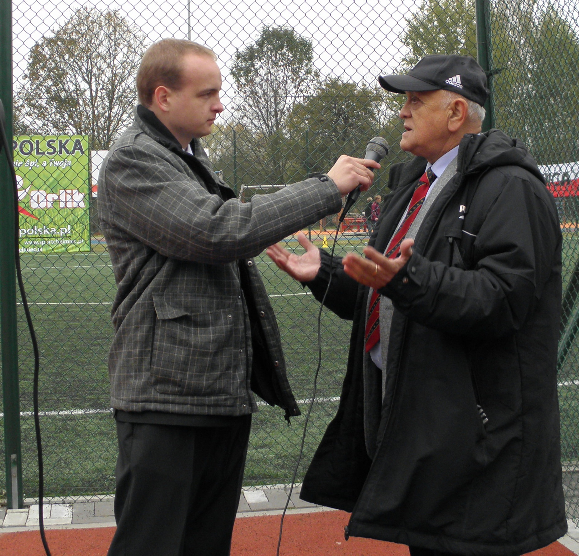 Kamil Zyzak i Andrzej Strejlau podczas finałów "Orlik Polska +16"